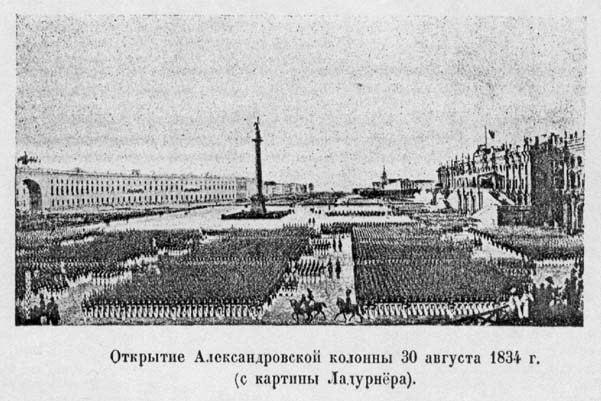 Церемония открытия Александровской колонны